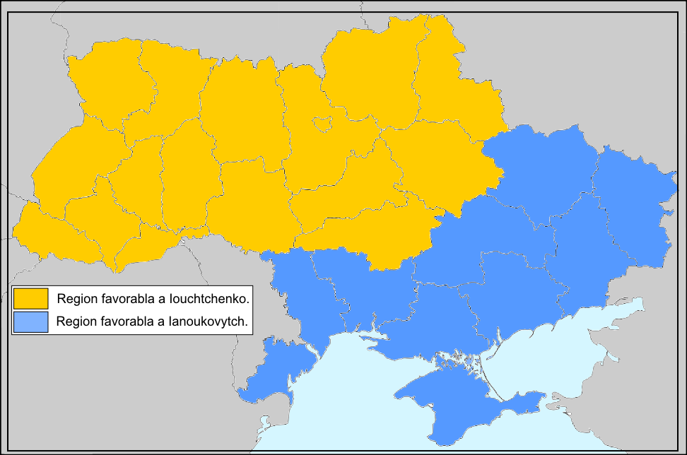 Resultats deis eleccions presidencialas ucrainianas de 2010.